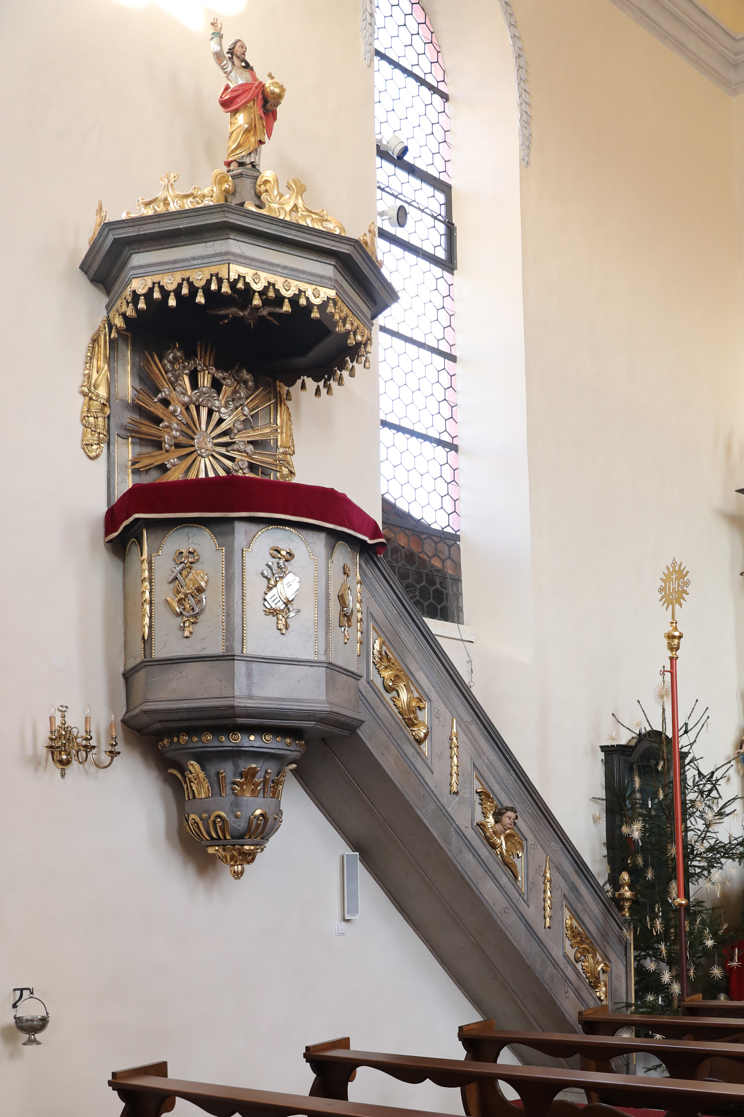 Altenbanz, St. Laurentius (Altenbanz)